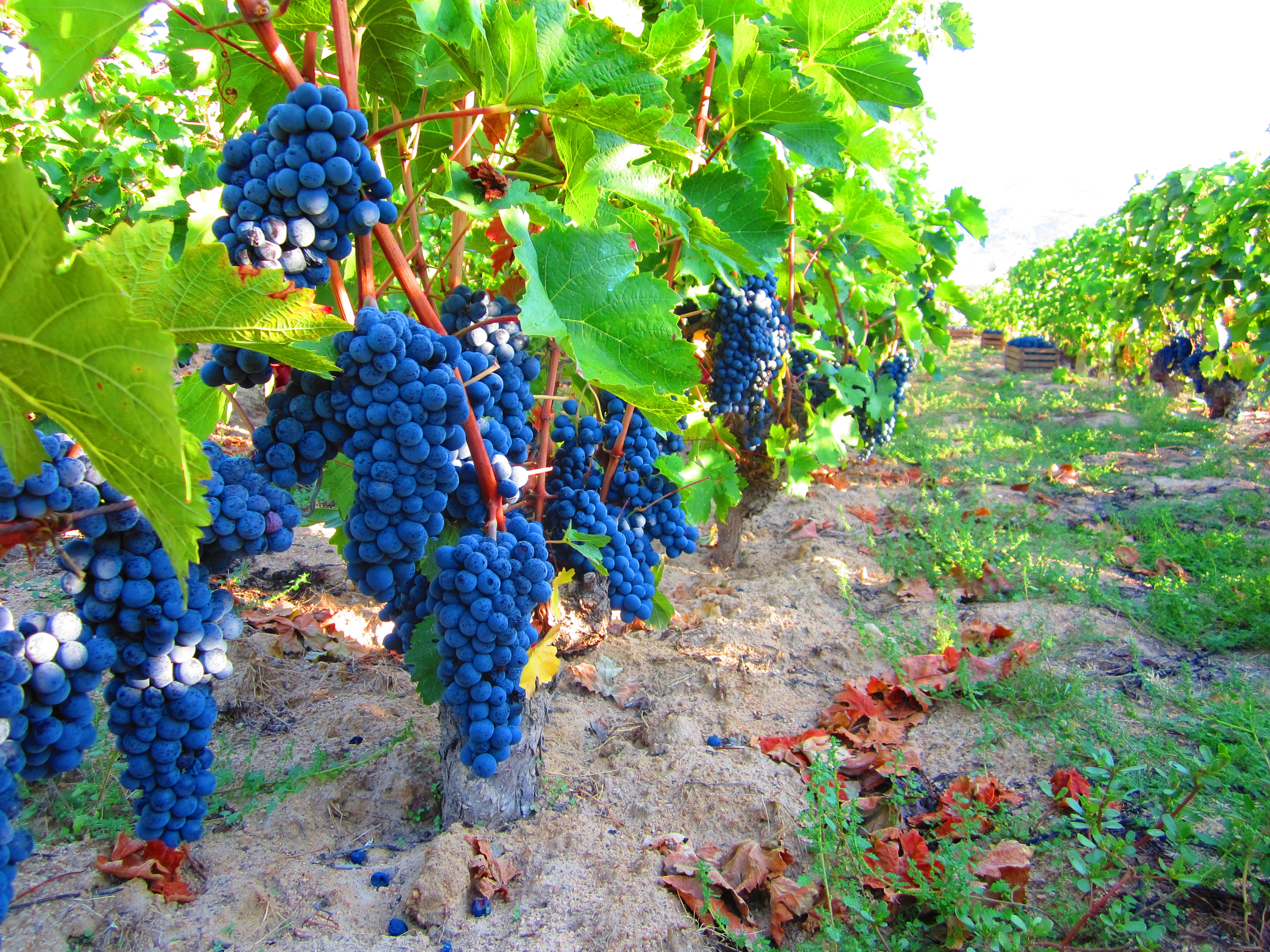 Познатото црно грозје за Балканот и Македонија - Вранец, од кое се добива јако црно вино. Фотографирано во с. Мажучиште - Прилеп.